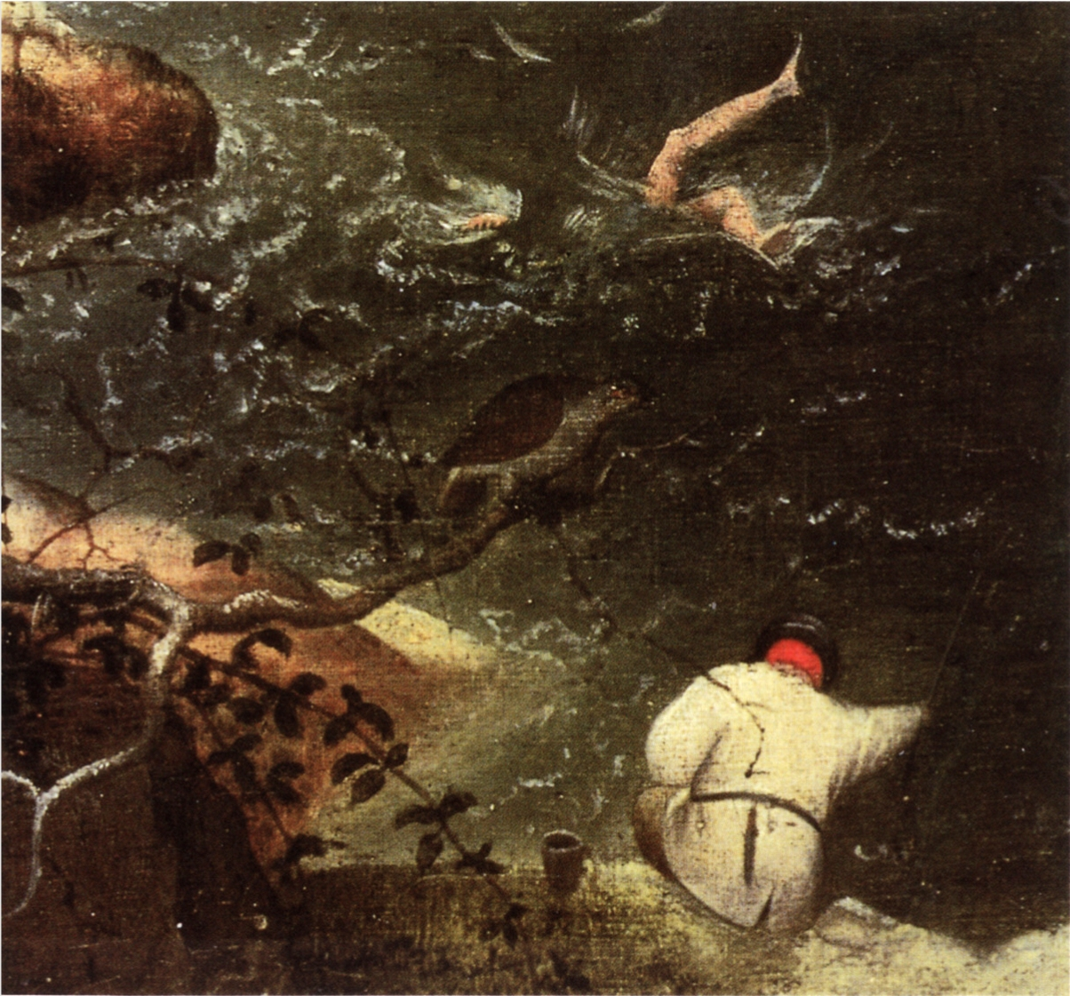 Ausschnitt aus dem Gemälde Landschaft mit dem Sturz des Ikarus